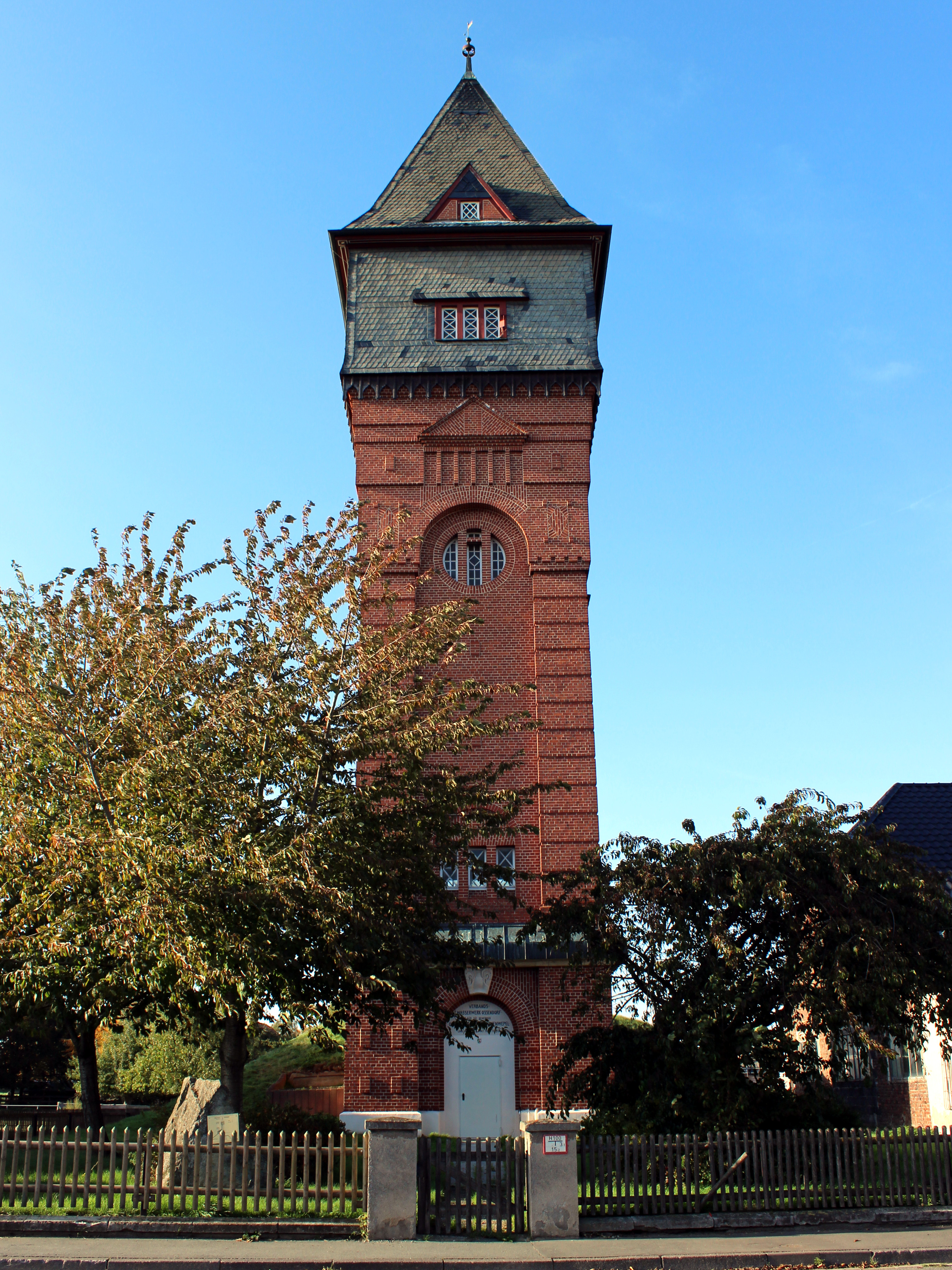 Wasserturm in Hohenwepel, Stadt Warburg, Ansicht von SüdostenThis is a photograph of an architectural monument.